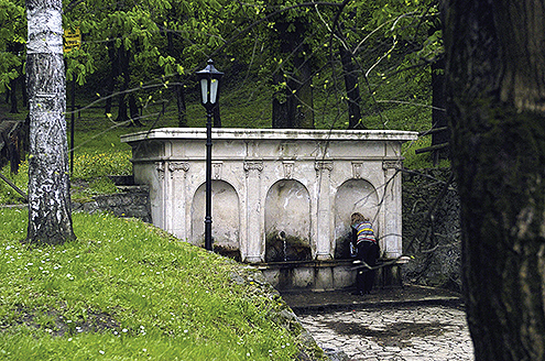 Хајдучка чесма